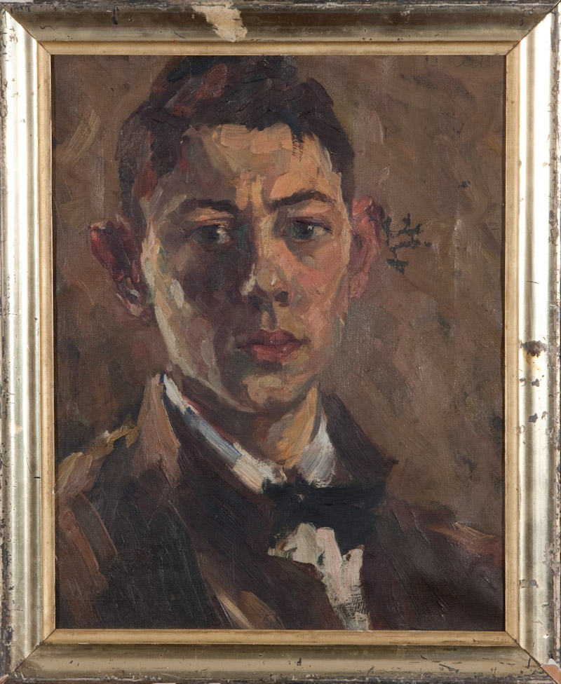 Hermann Euler, Selbstportrait, 1922, Öl auf Leinen, 42,5x34 cm